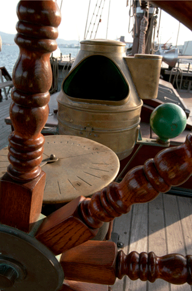 Bitácora y axiometro